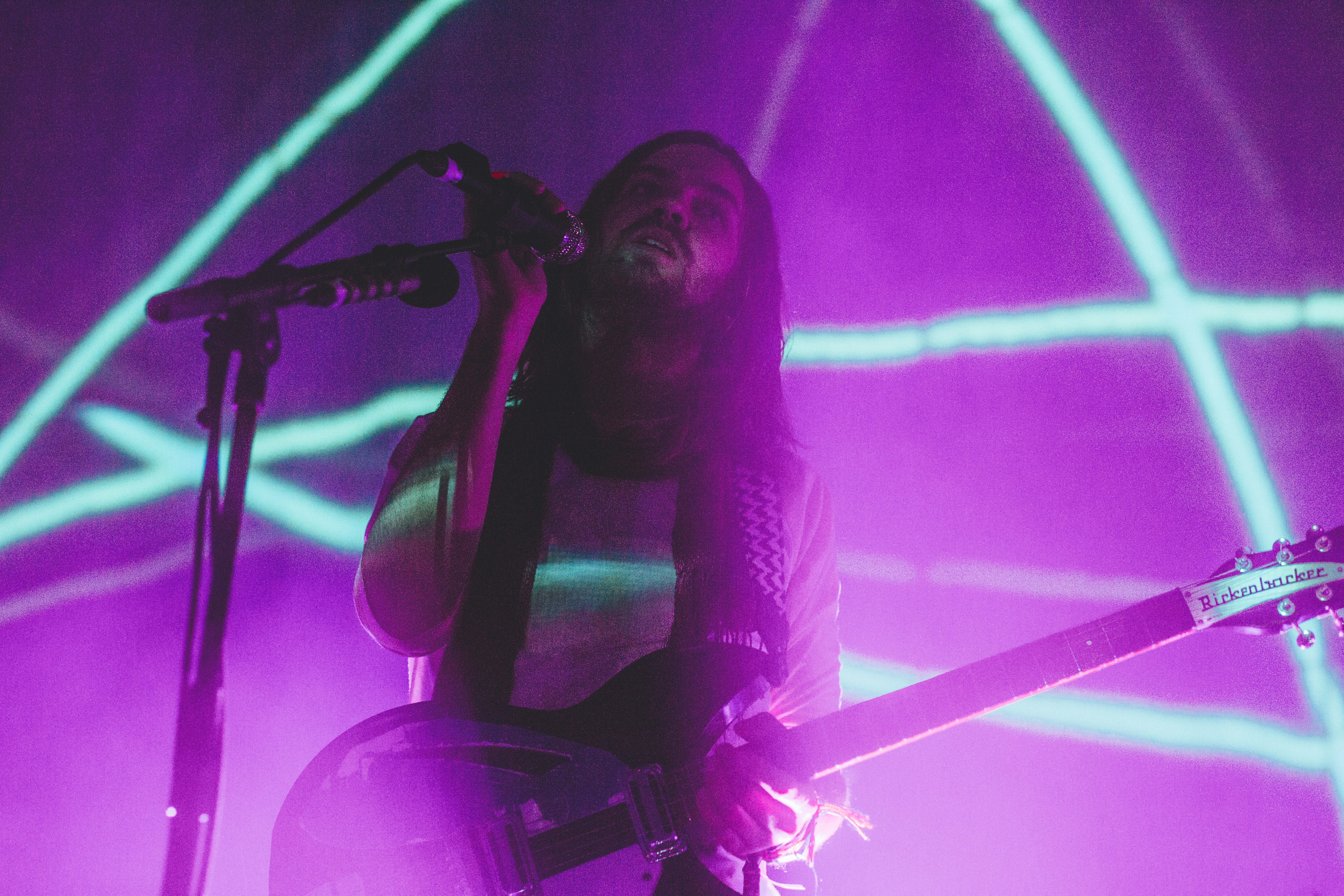 Tame_Impala-3858